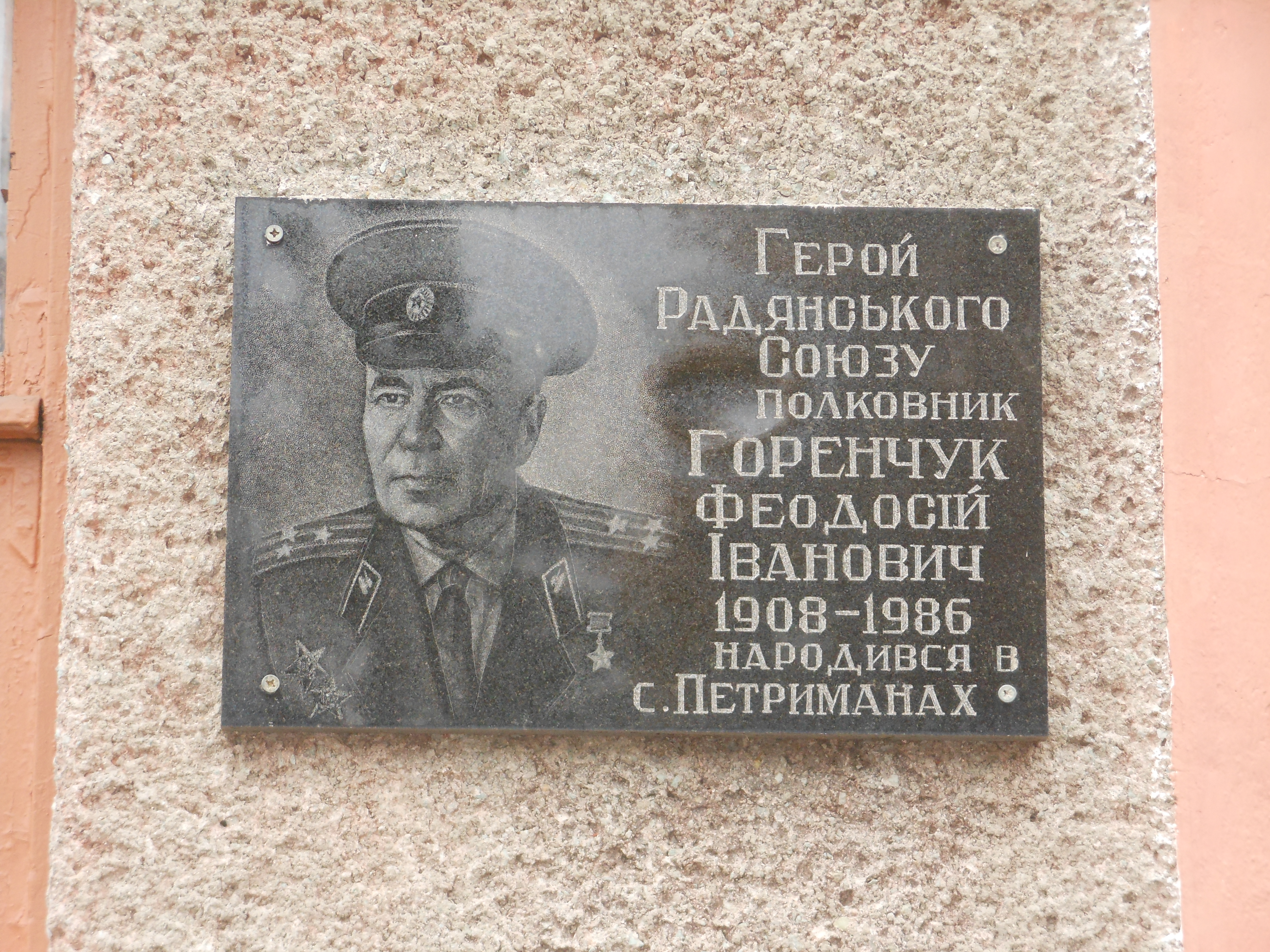 Меморіальна дошка Горенчуку_Феодосію_Івановичу (2017-10) в Мур-Курилівцях Вінничина